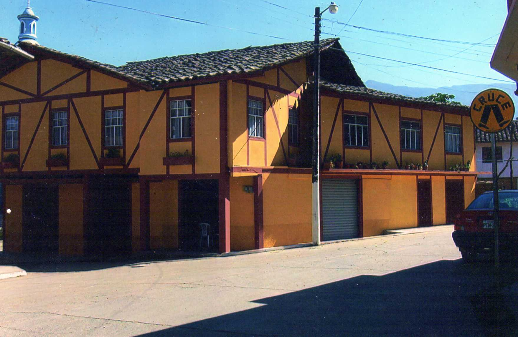 Casa Colonial en la parroquia Huertas, cantón de Zaruma, provincia El Oro, Ecuador